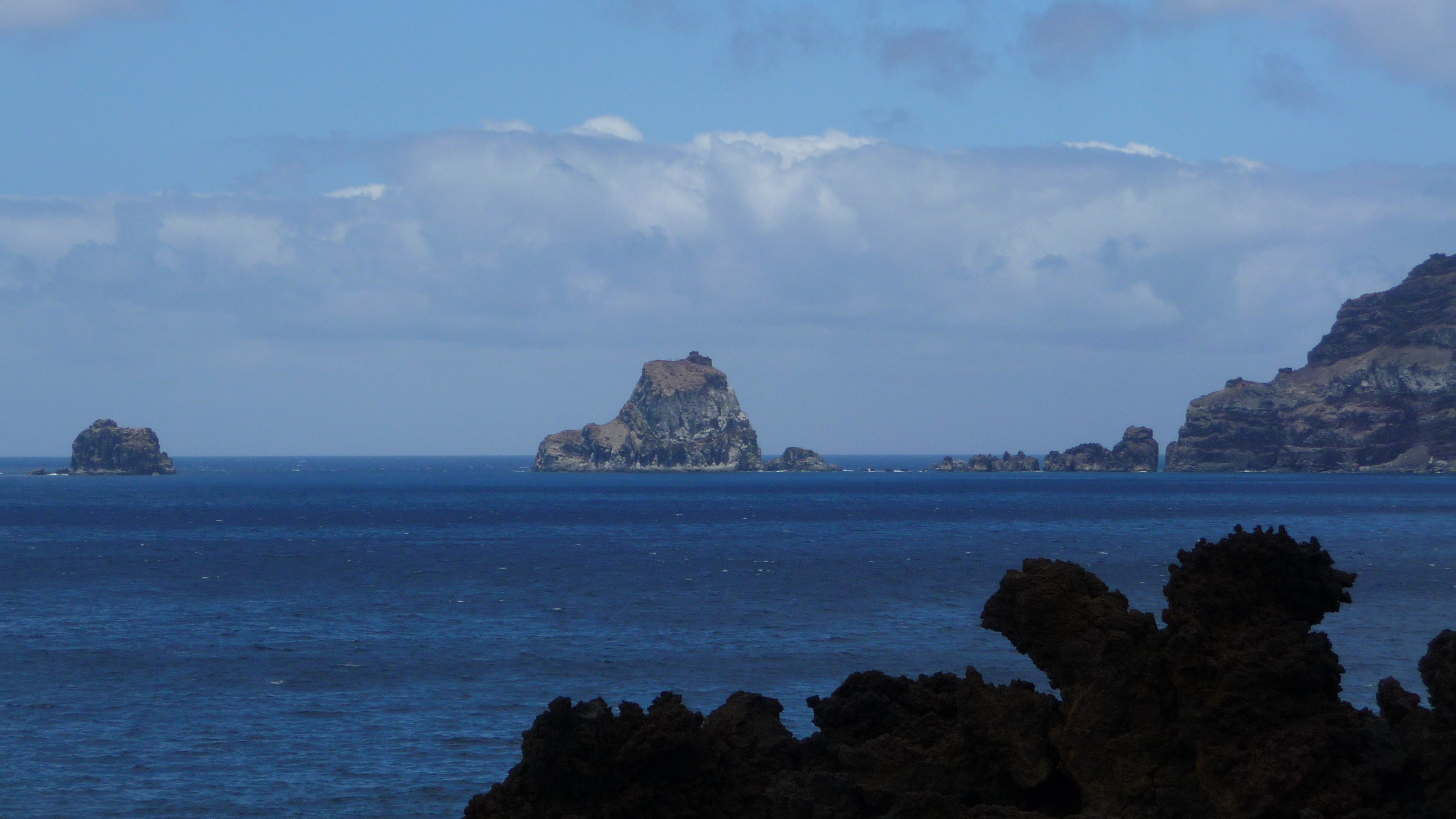 Los Roques de Salmor desde el sendero litoral de las puntas. This is a photography of a Site of Community Importance in Spain with the ID: ES7020002. Natura2000 entry, EEA entry